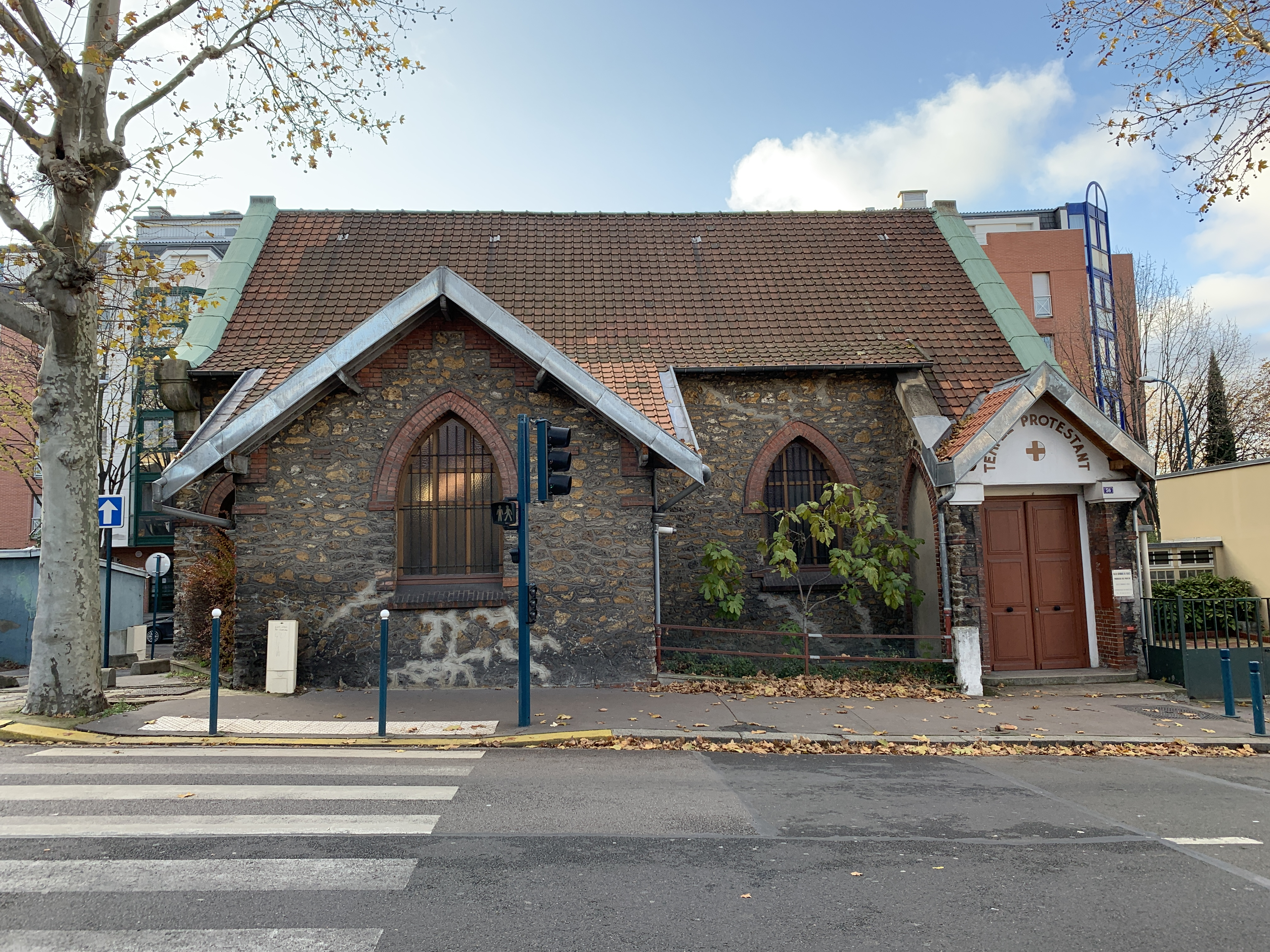 Temple protestant de Pantin.